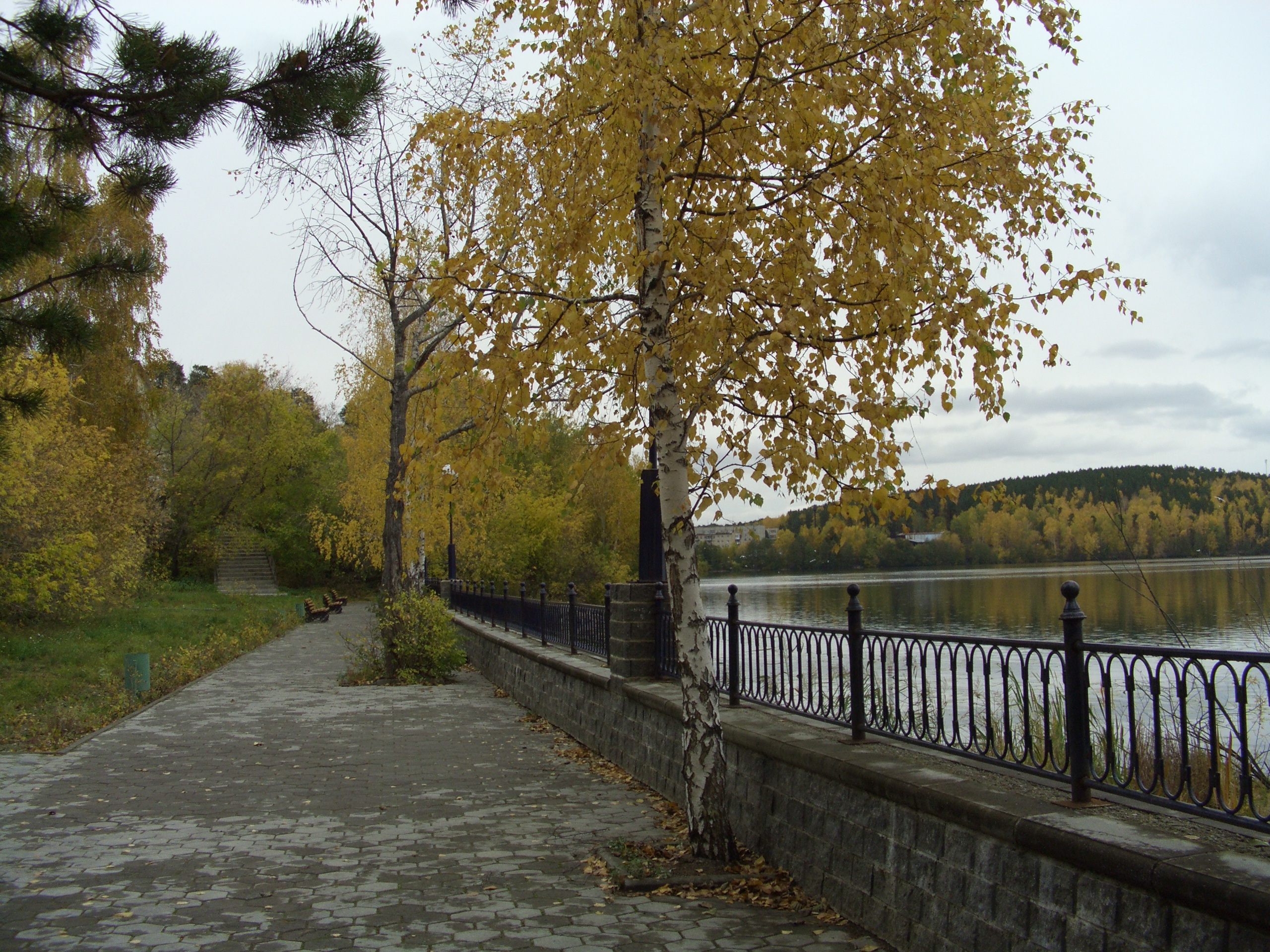 санаторий Кисегач,оз.Теренкуль